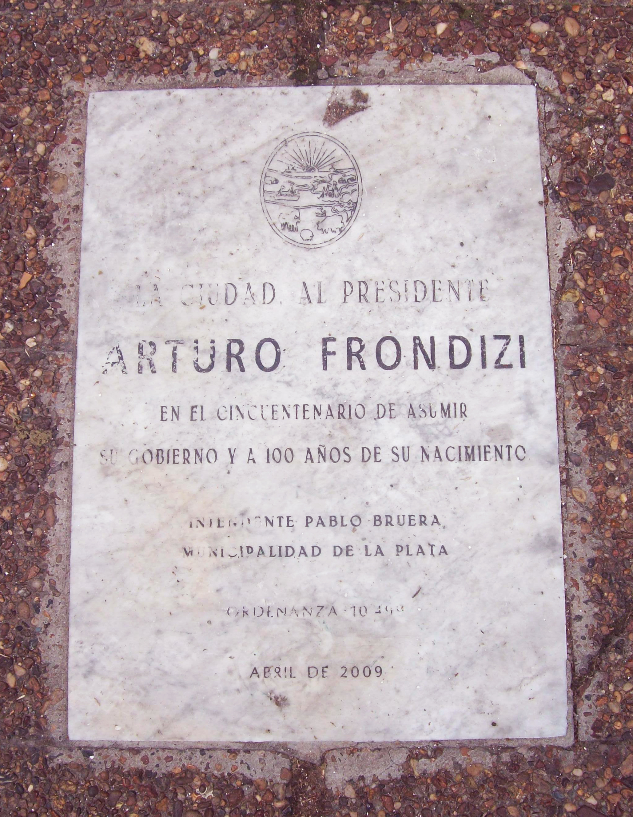 Placa de mármol en la Avenida 53 (ciudad de La Plata) en conmemoración a los cincuenta años de asunción del presidente Arturo Frondizi, y a los cien años de su nacimiento.